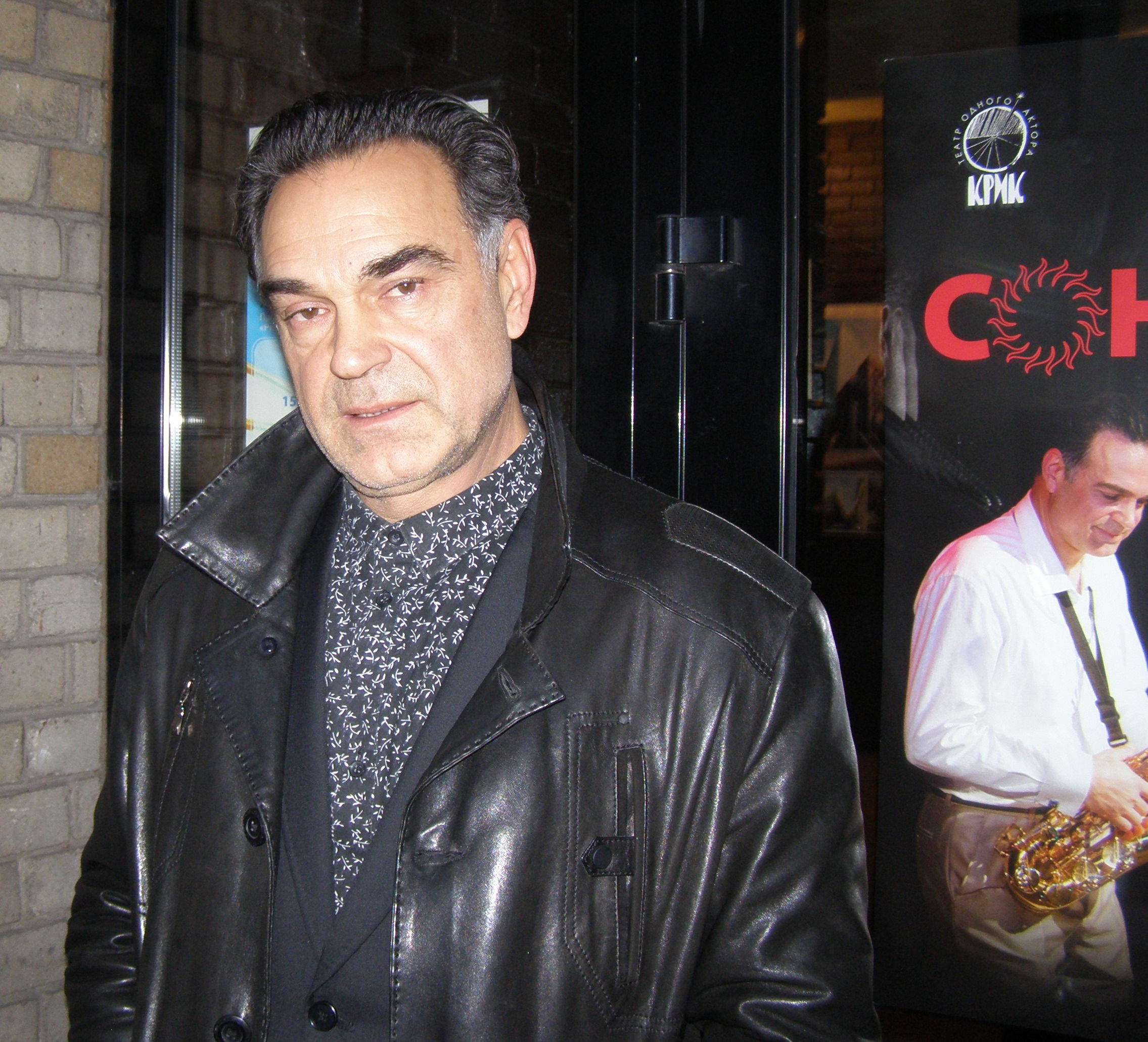 Народний артист України Мельник Михайло Васильович, актор і режисер Академічного українського театру одного актора «Крик»